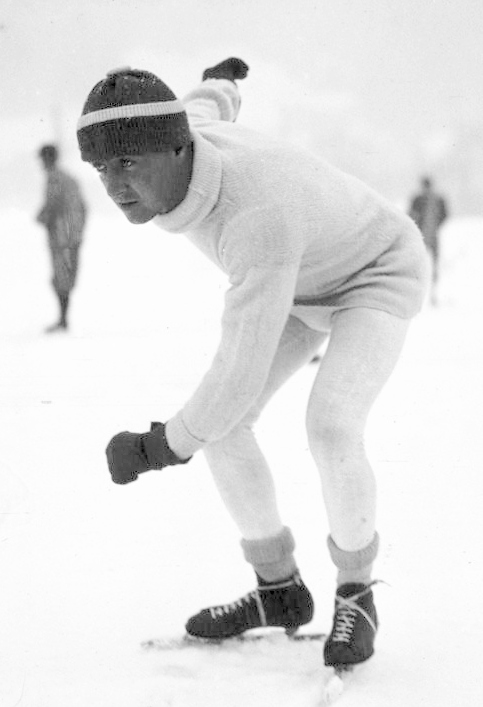 Chamonix : Hassler, champion de France, patinage vitesse : [photographie de presse] / Agence Meurisse